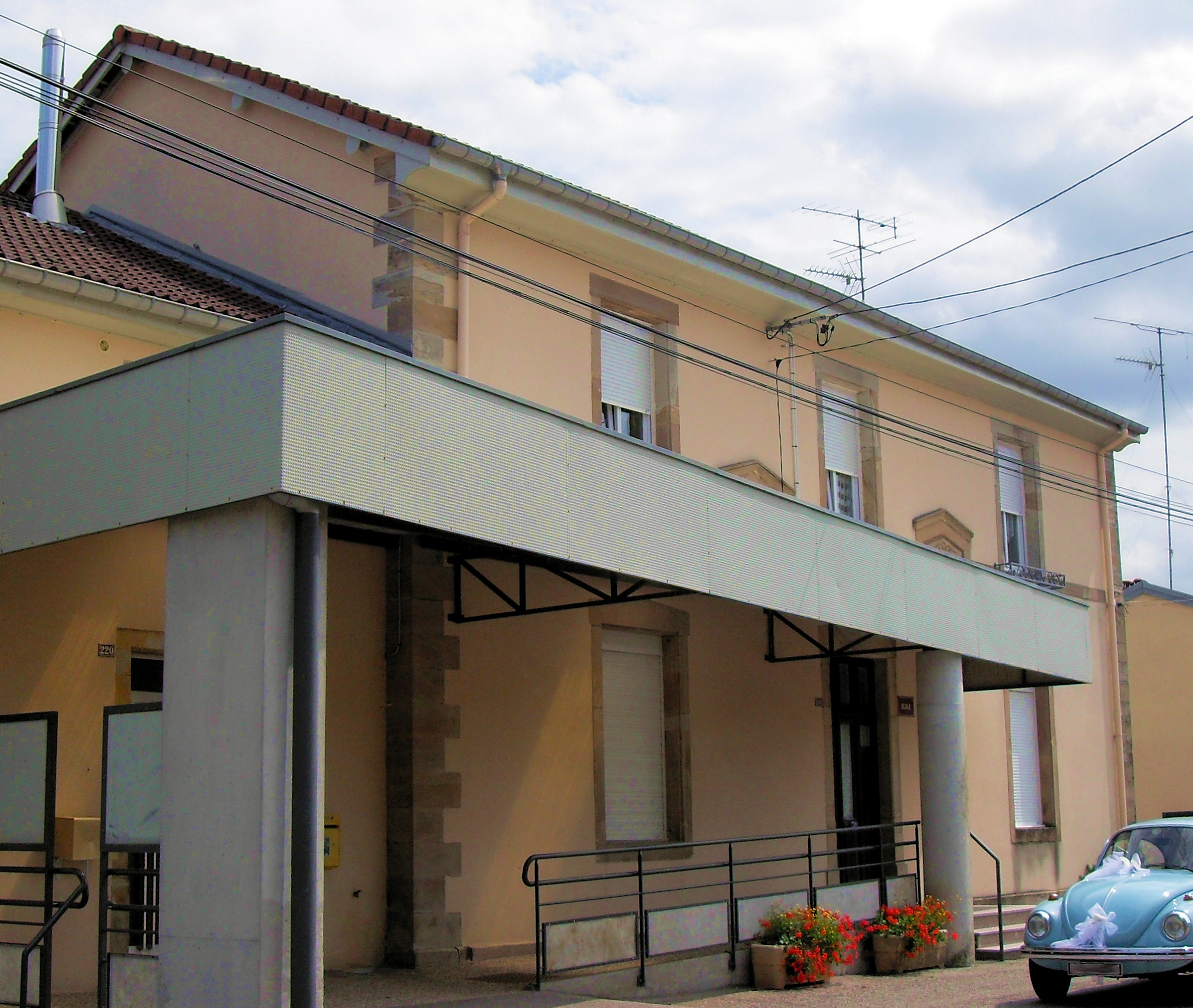 La mairie´-école d'Évaux-et-Ménil